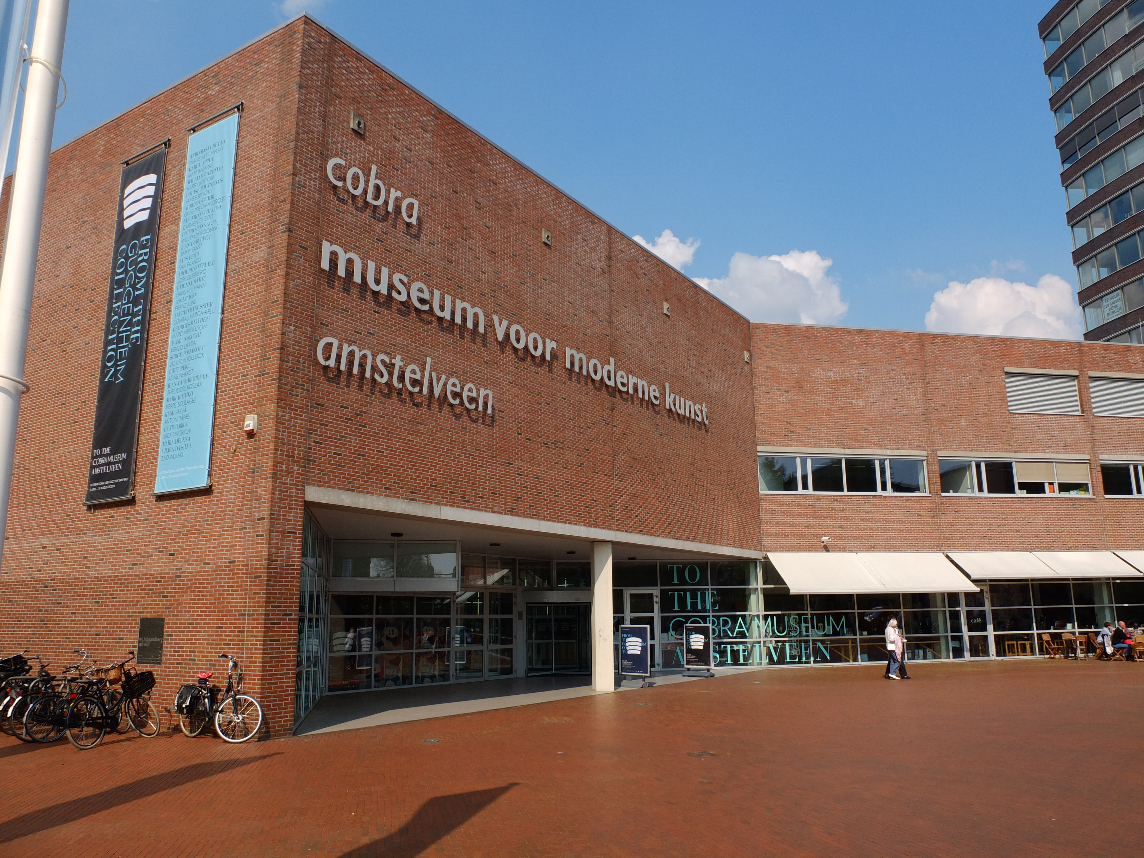 Cobra Museum in Amstelveen